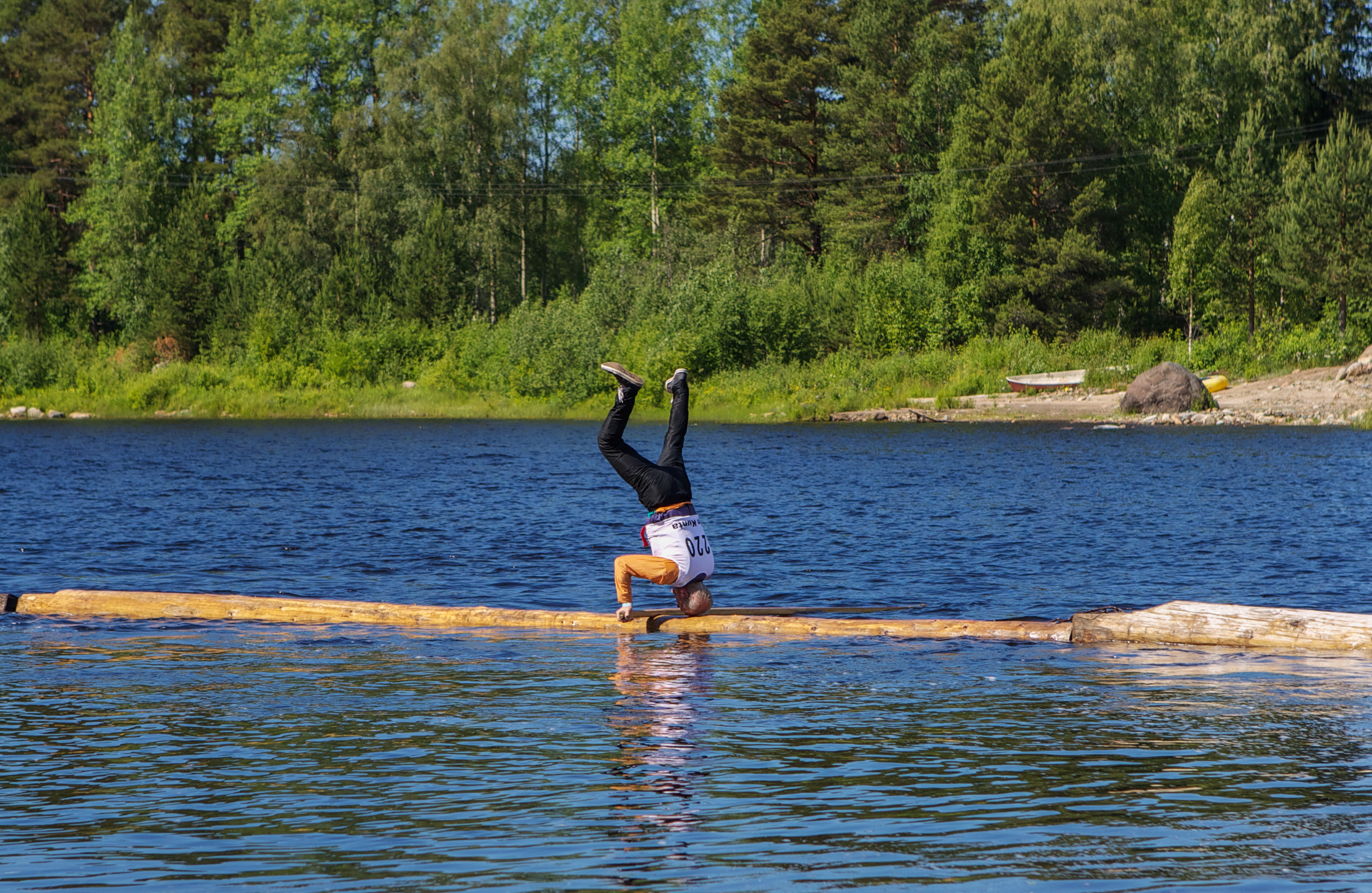 Iin tukkilaiskisat, tukkilaistemppuja